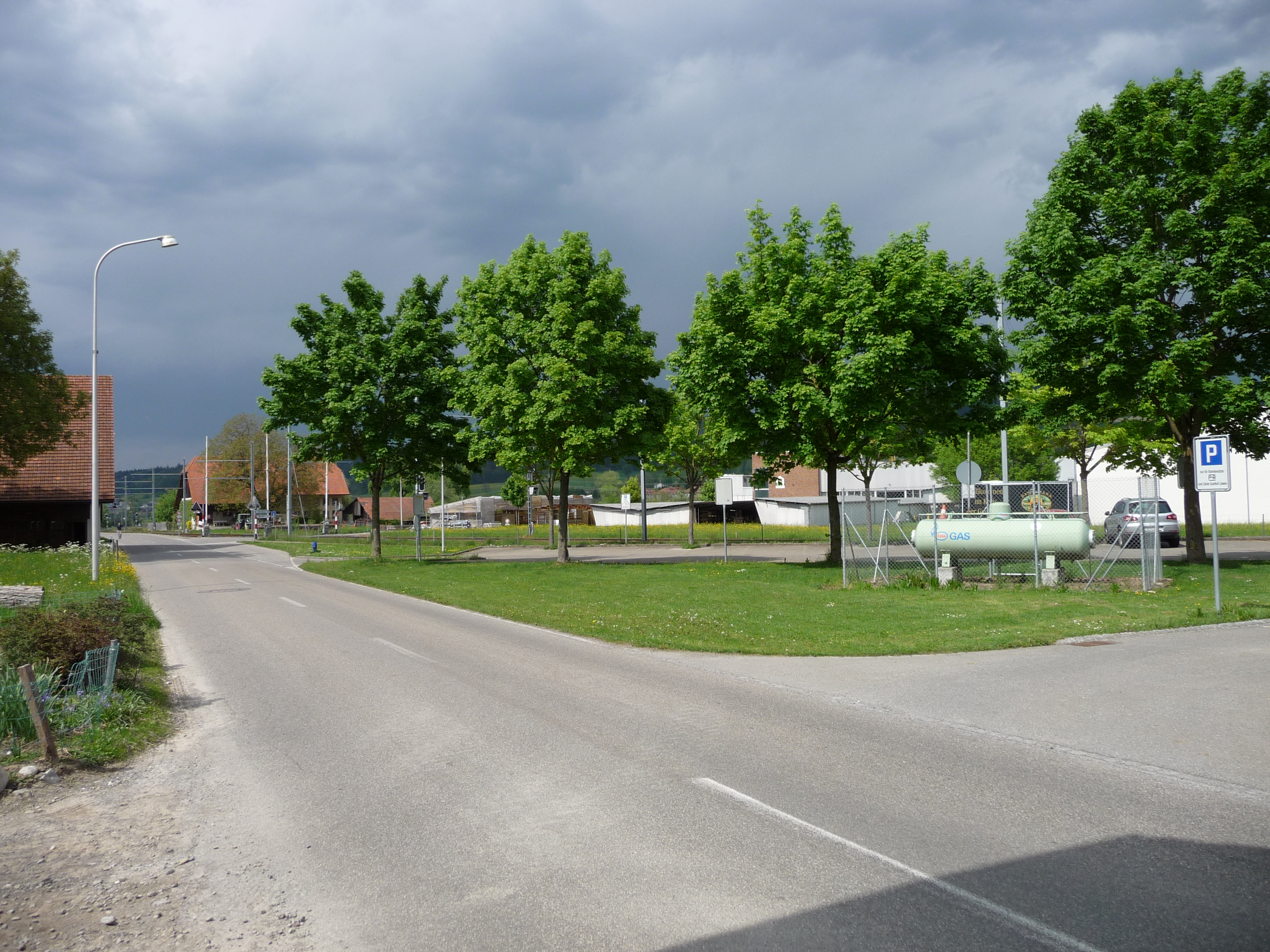 Gontenschwil